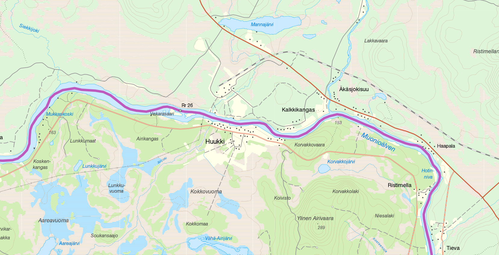 Orten Huukki. Bakgrundskarta från Lantmäteriet, skala 1:30 236.